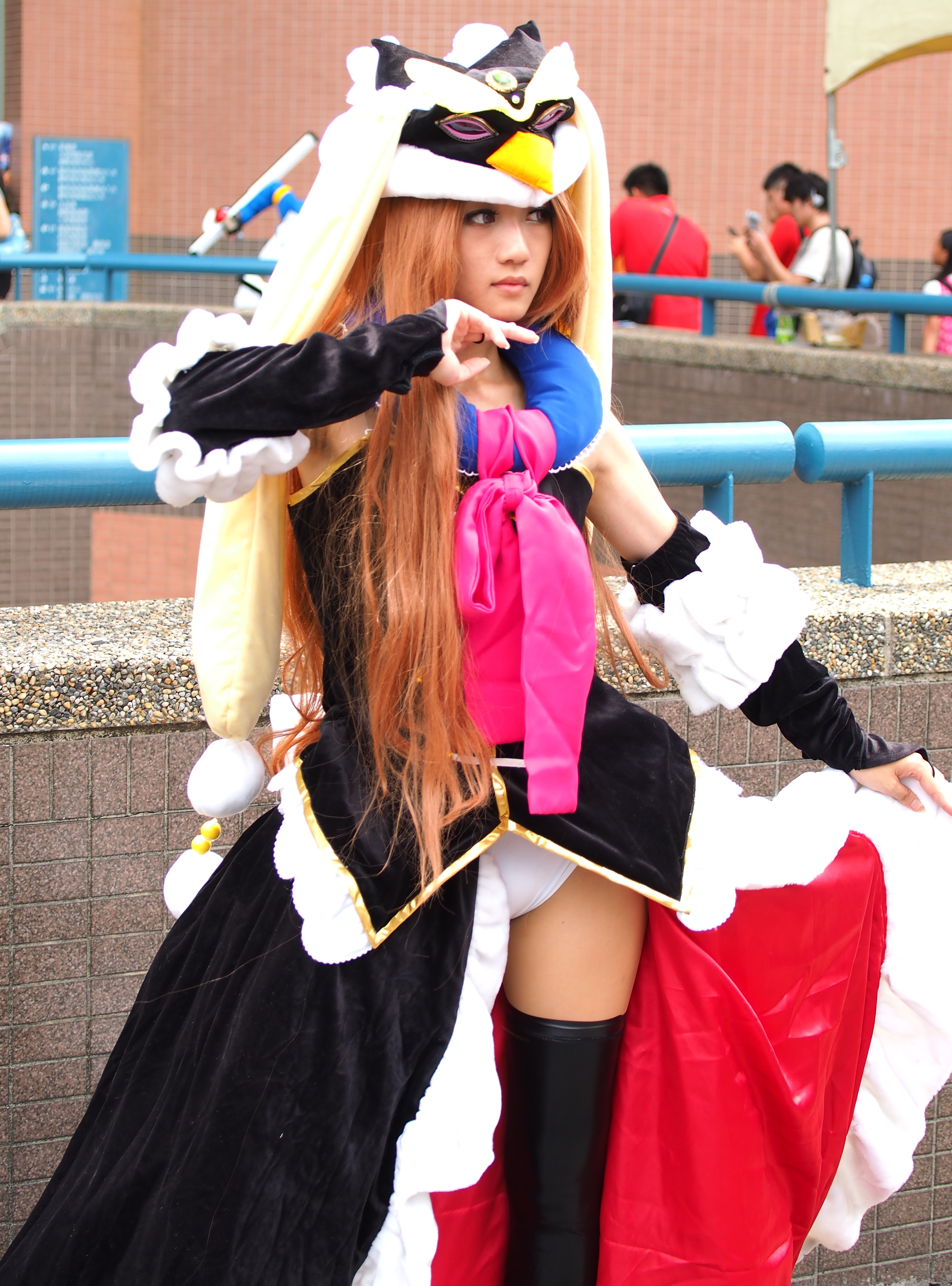 第22屆開拓動漫祭，《轉吧！企鵝罐》水晶公主cosplayer。